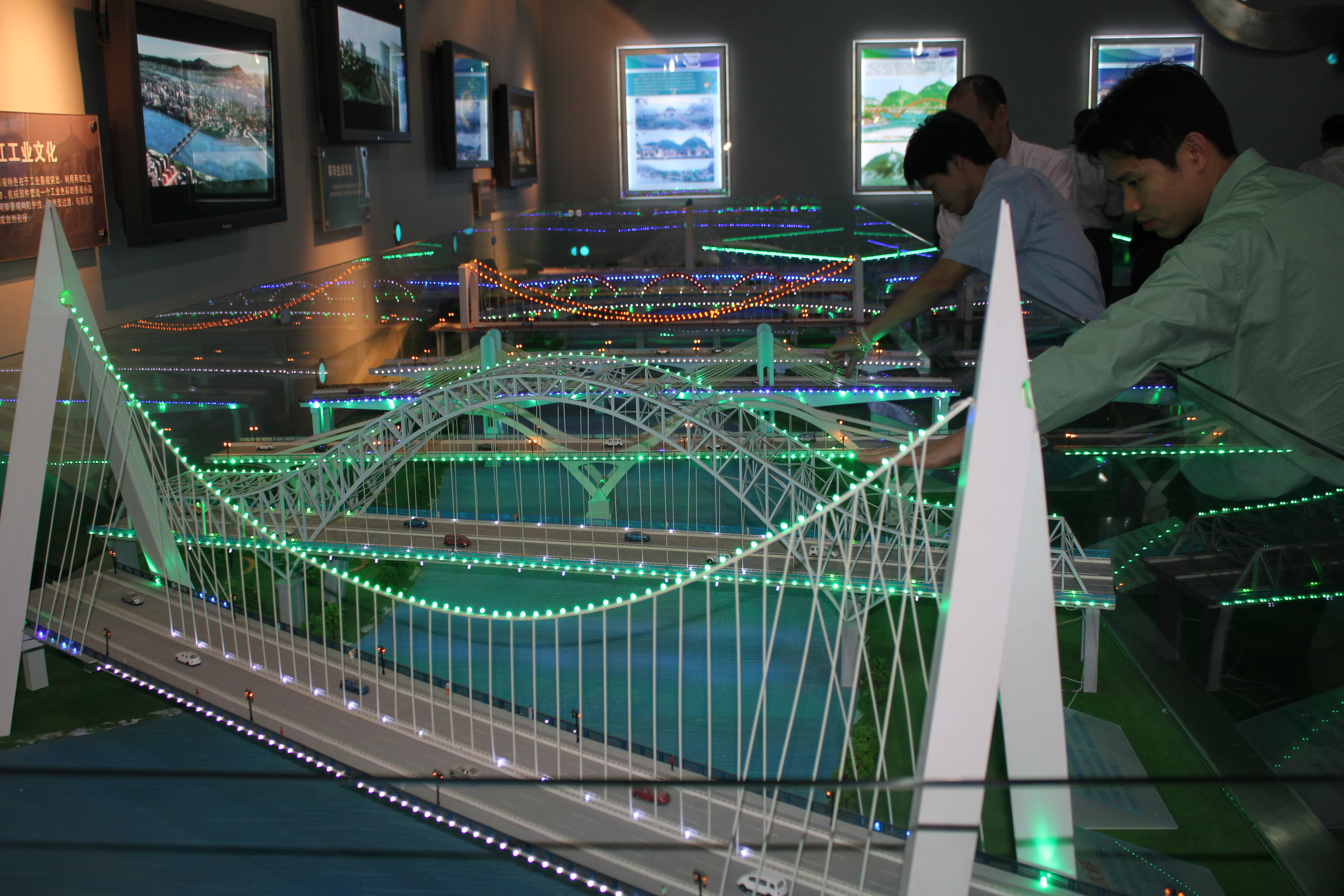 柳州的桥梁模型